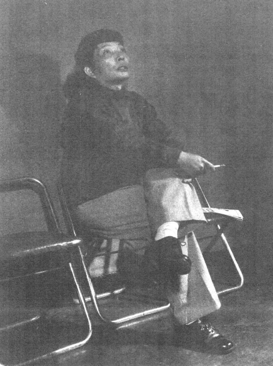 読売新聞社『家庭よみうり』402号（1954年）より花森安治